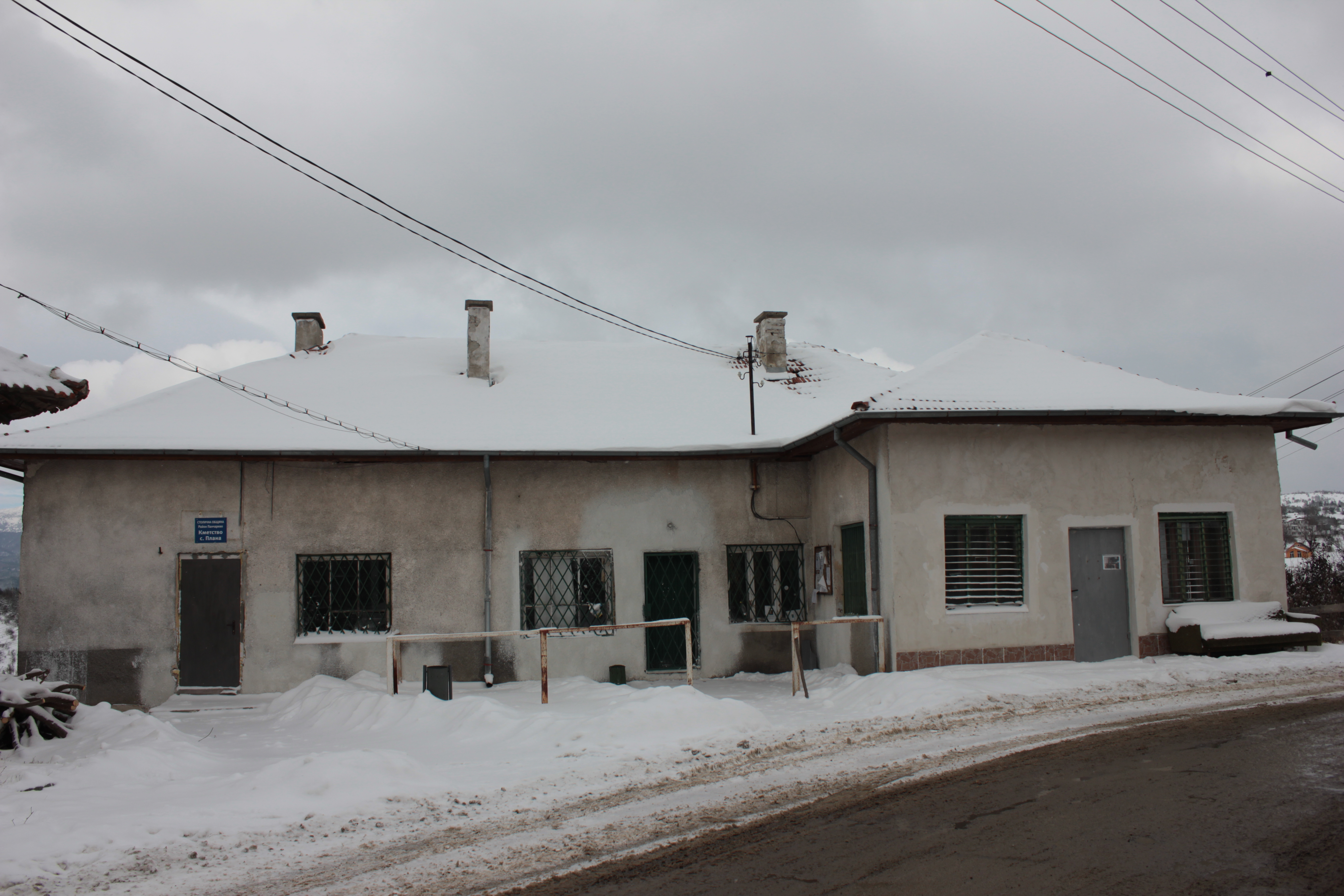 Кметство Плана